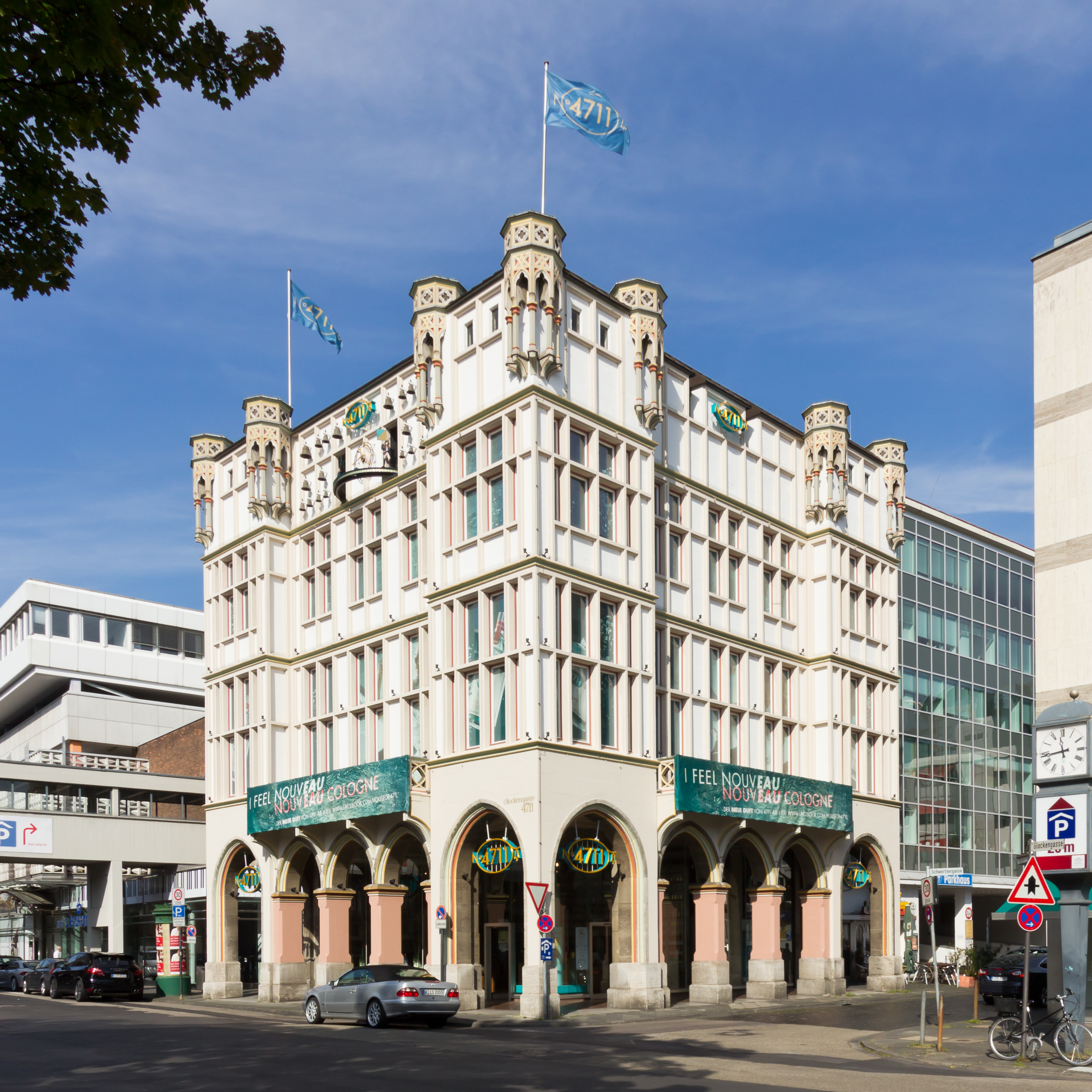 4711-Stammhaus Glockengasse/Ecke Schwertergasse